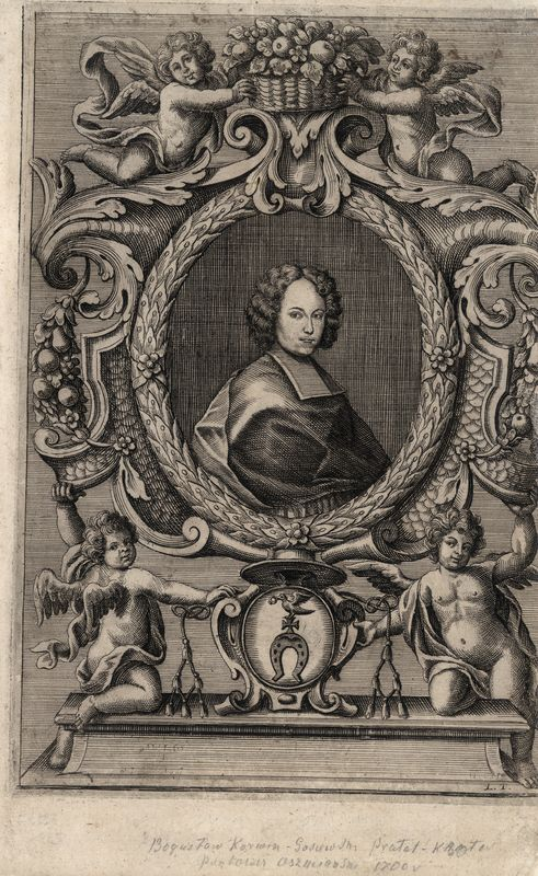 Беларуская (тарашкевіца): Партрэт Багуслава Корвіна-Гасеўскага (Bahusłaŭ Korvin-Gasieŭski)